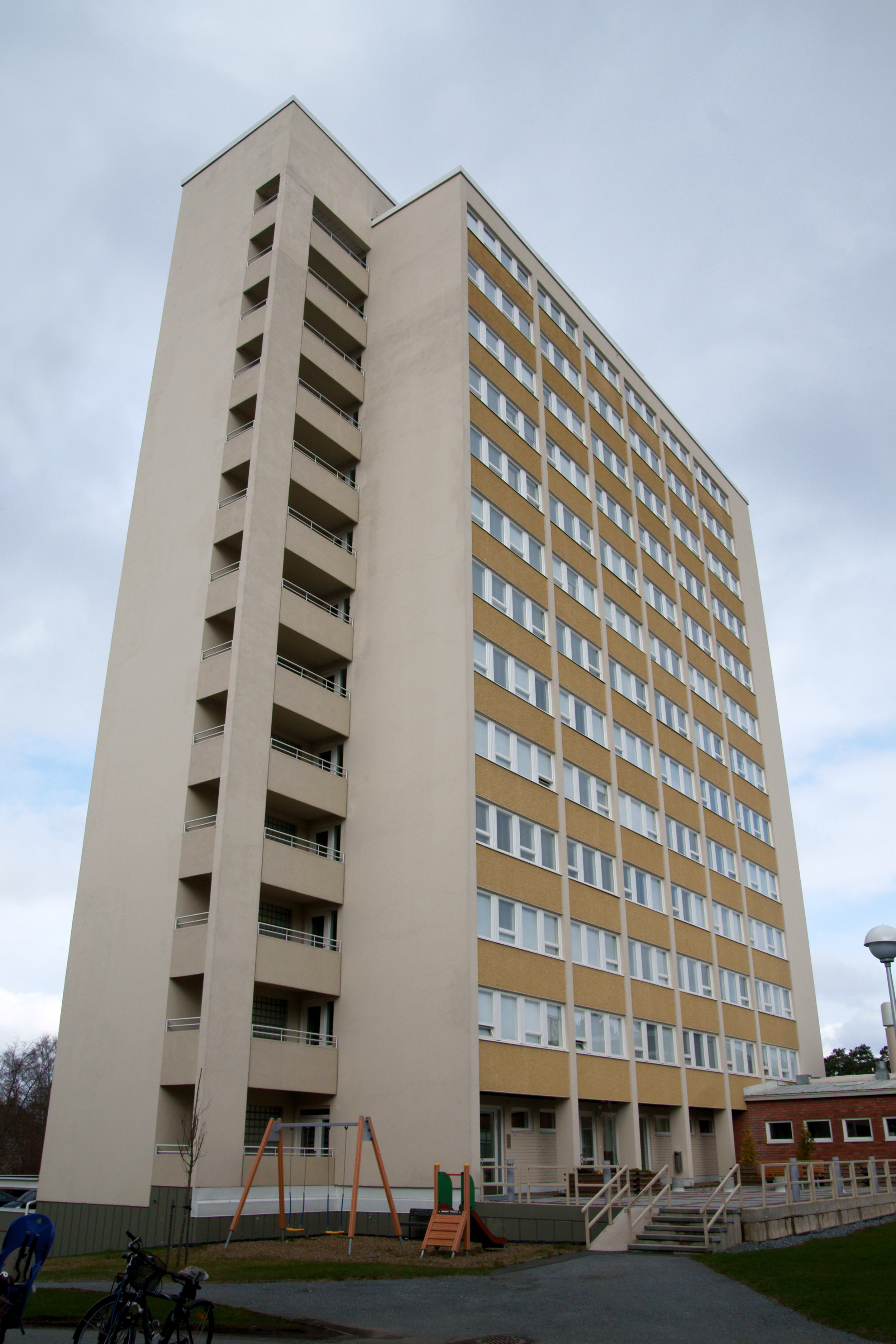 Porin korkein asuinrakennus, vuonna 1962 valmistunut Sairaanhoito-oppilaitoksen asuntola eli soho Tiilimäellä, Porissa. Rakennus on 51,72 metriä korkea ja siinä on 15 kerrosta.